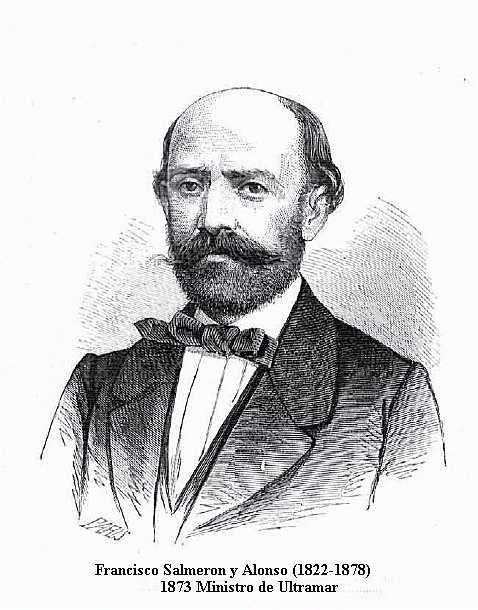 Francisco Salmeron y Alonso (1822-1878) Ministro de Ultramar 1873